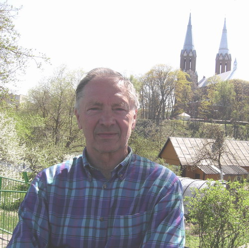 Fotografas Romualdas Rakauskas, Anykščiai, 2008 m. gegužės 2 d.